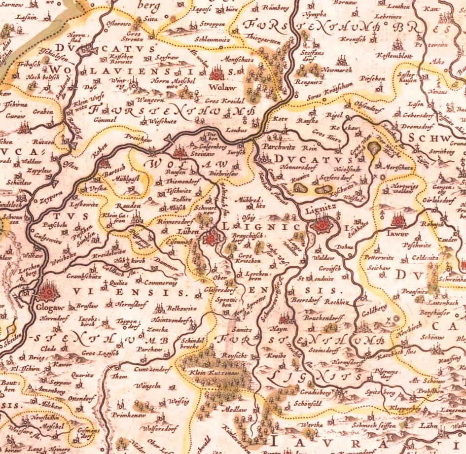 Księstwa legnickie i wołowskie w 1645 roku